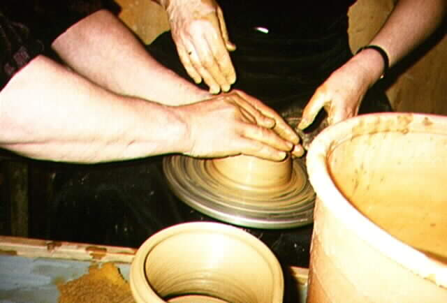 Lera formas på drejskiva. Foto: Einarspetz